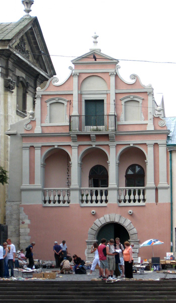 Львов, Королевский арсенал